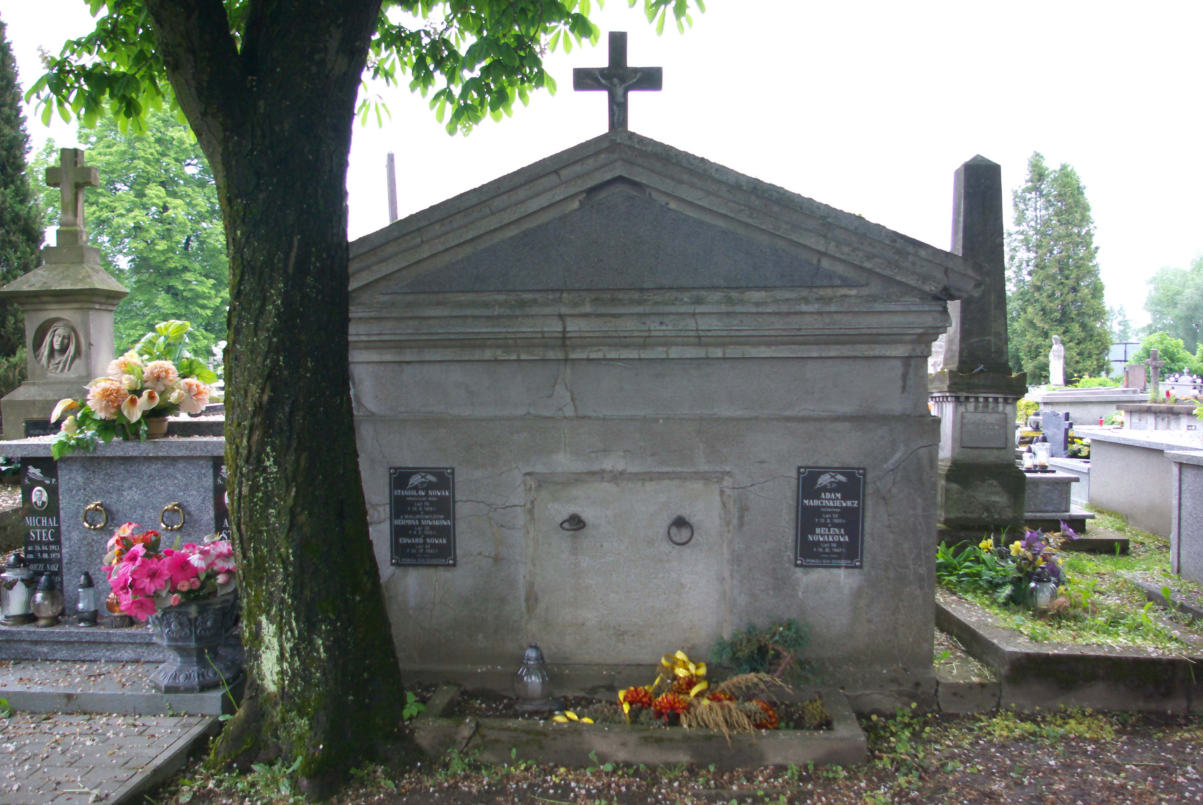 Grobowiec rodziny Nowaków na Cmentarzu Centralnym w Sanoku.